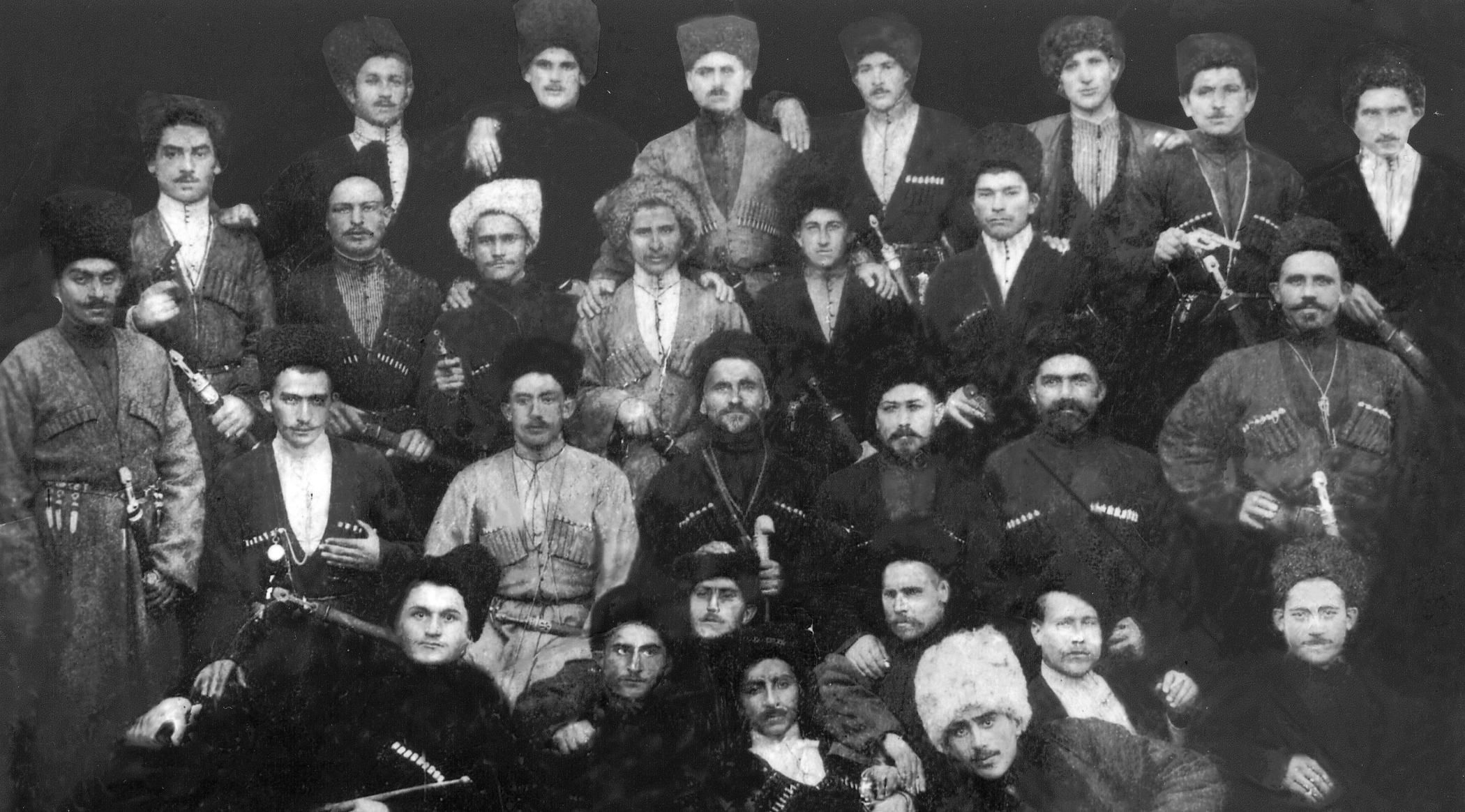 Осетины. Начало XX века.